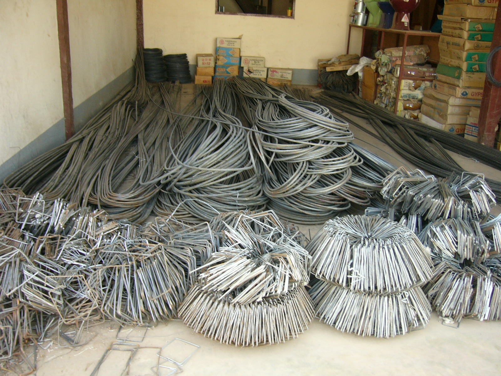 Unverbaute Bohrpfahlbewehrung (Stahl).